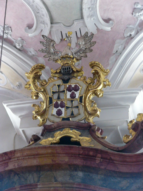 Wappen eines Lamdkomturs? aus der Familie von Eyb in der katholischen Schlosskirche in Absberg